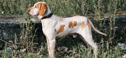 Ca mè